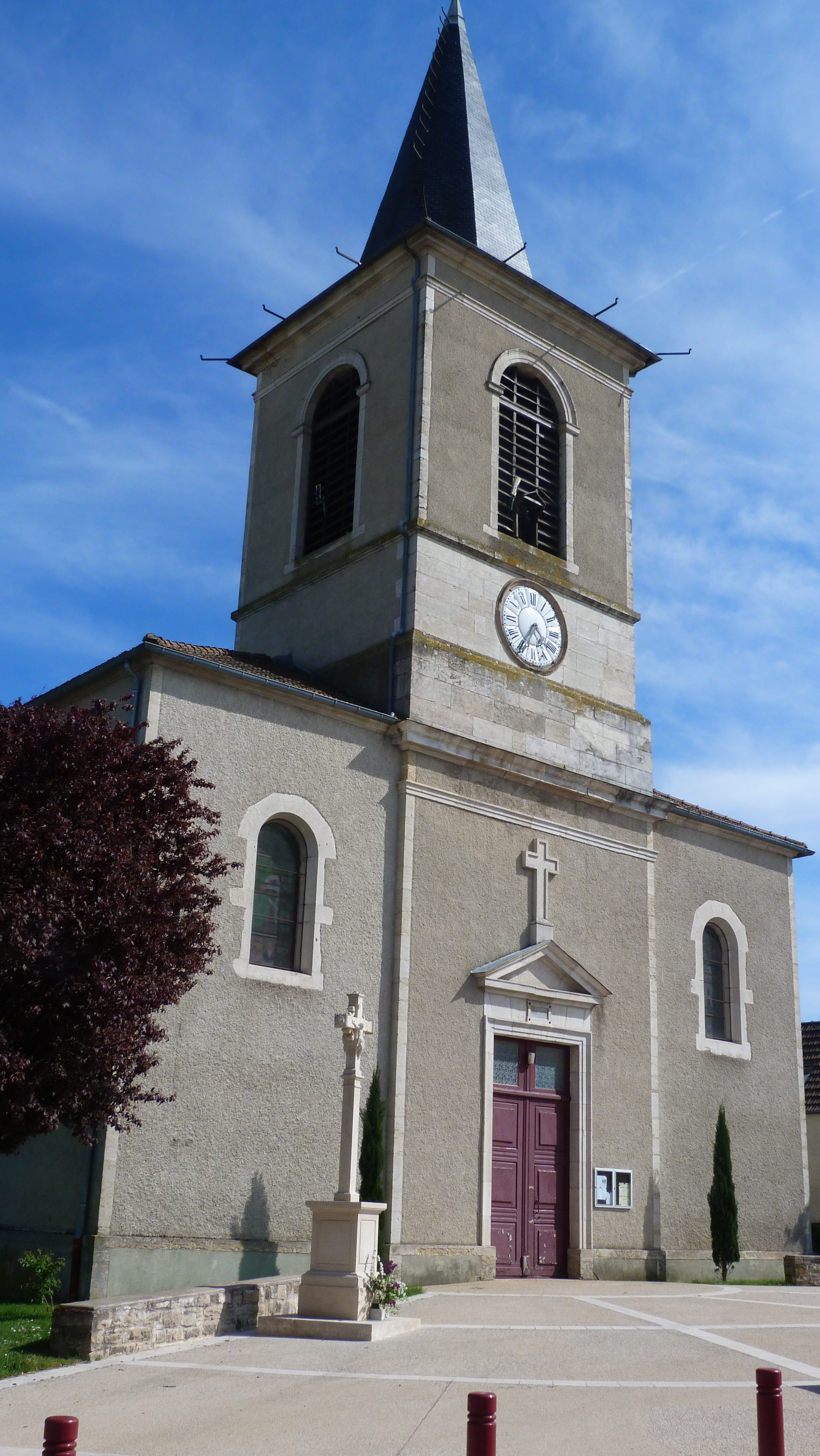 La kirko de Ruffey-lès-Echirey